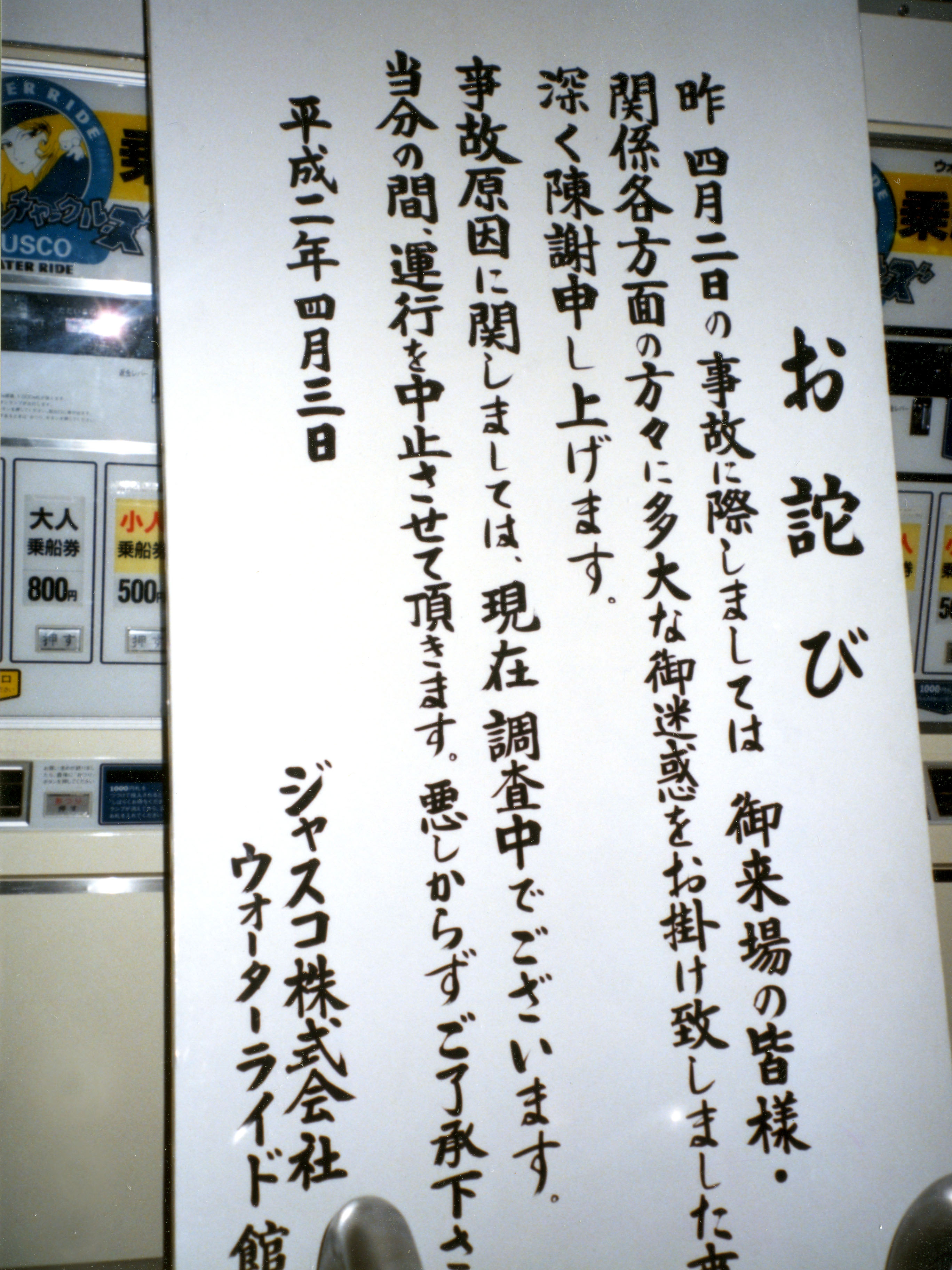 EXPO'90 JUSCO WATER RIDE,Tsurumi-ku Osaka-City Osaka Japan.